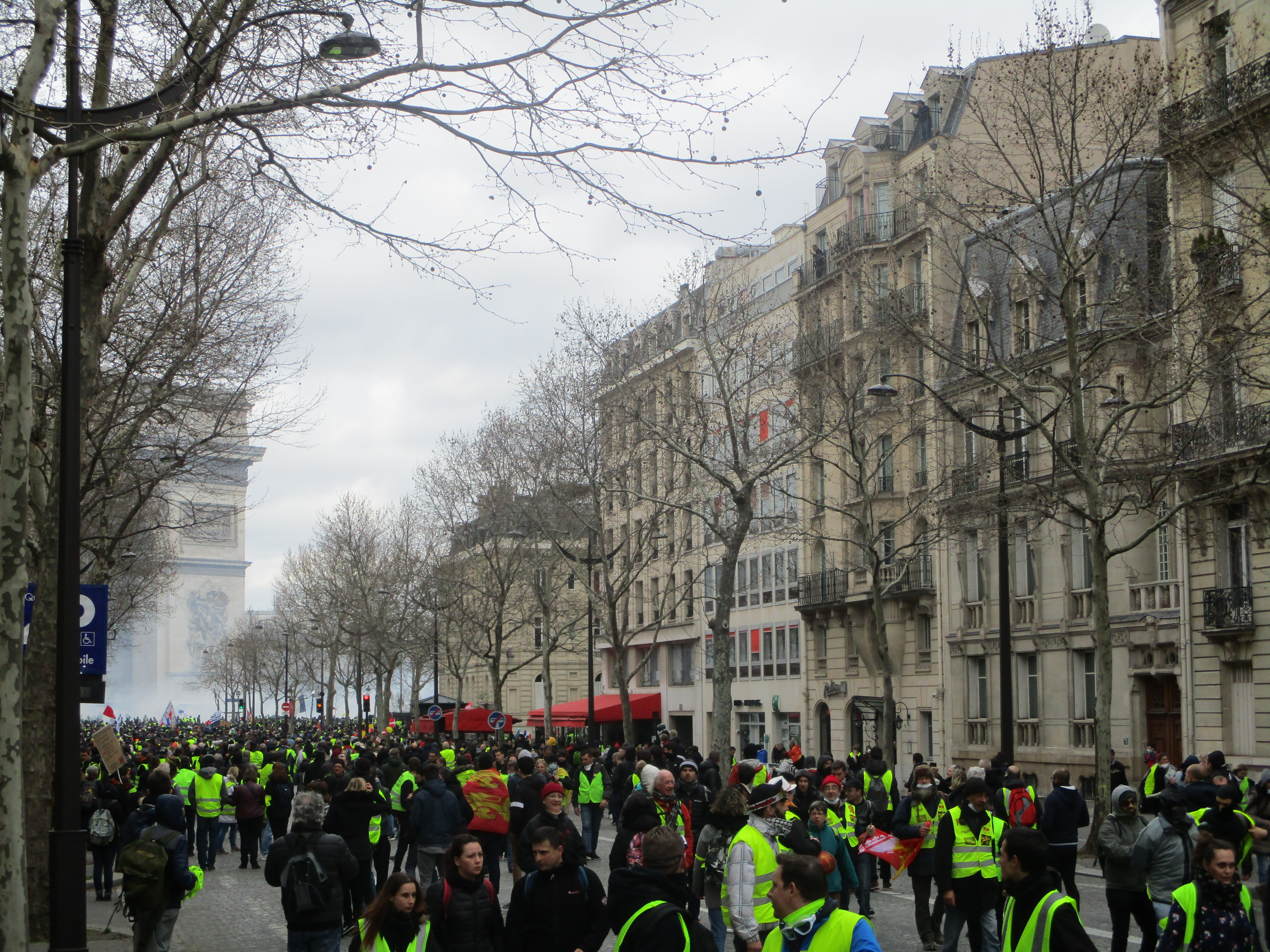 Il est presque midi le samedi 16 mars 2019 à Paris pendant la manifestation des gilets jaunes. Les gaz lacrymogènes lancés de la place de l'Étoile sont si forts qu'une partie de la foule part par l'avenue Marceau.